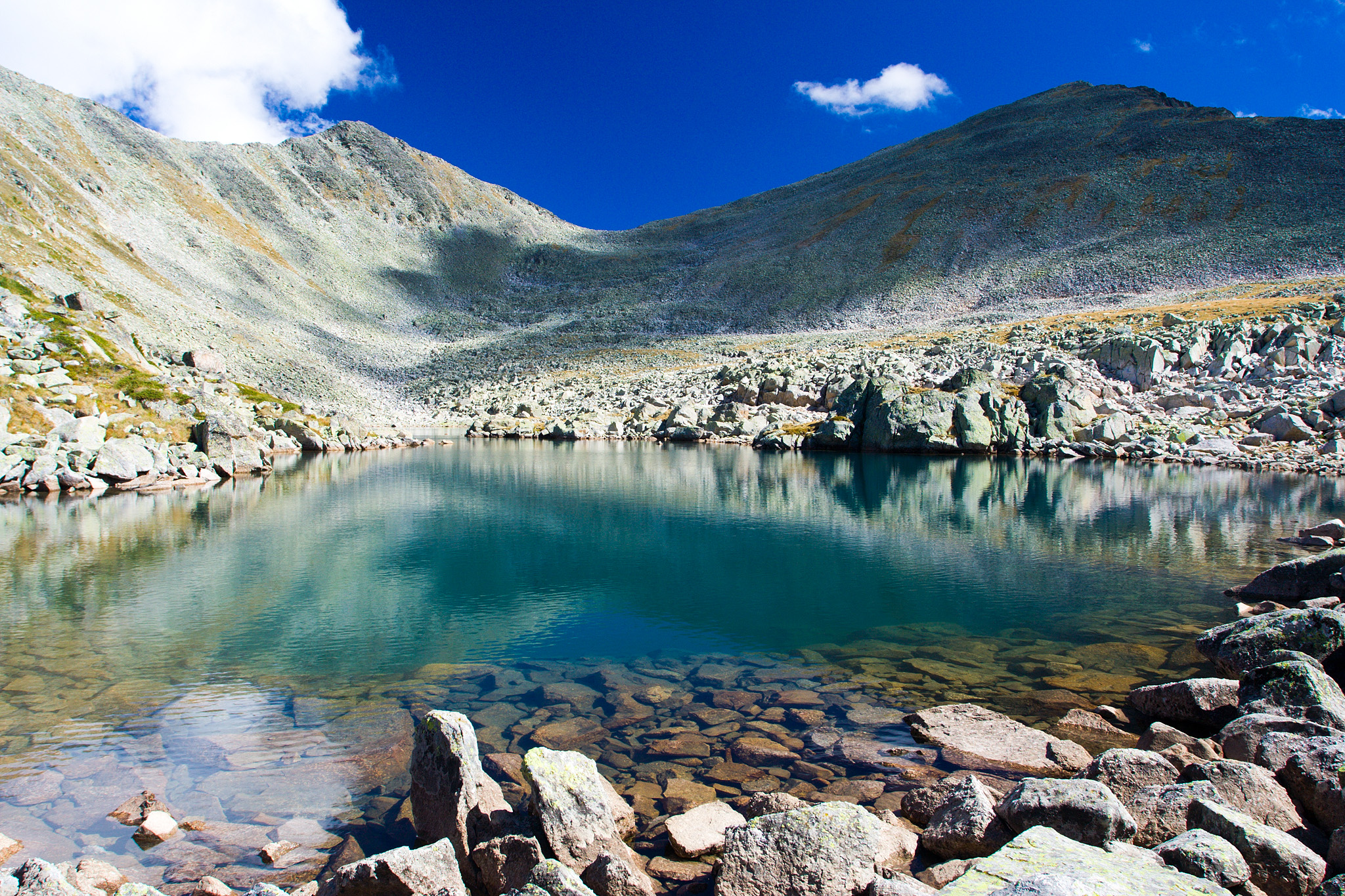 Пирин, Пирин, Горното Газйско езеро